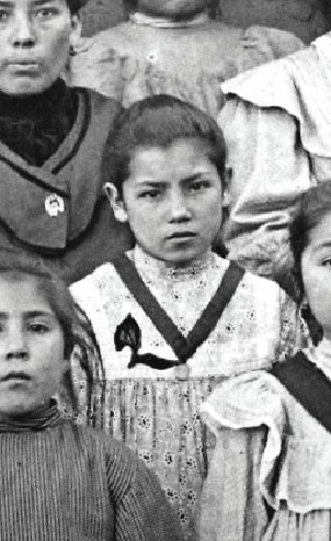 El verdadero rostro de Laura Vicuña.